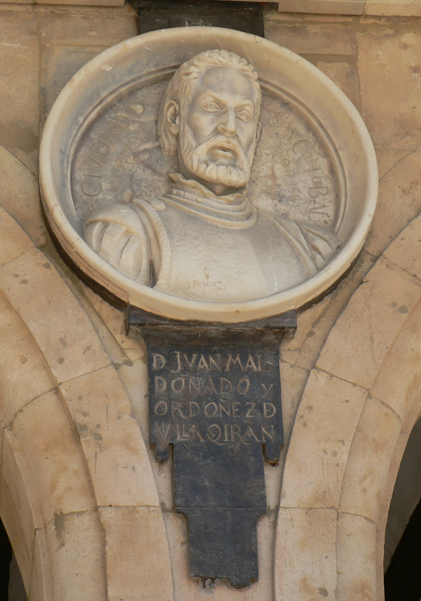 Medallón con la efigie de Juan Maldonado, conquistador español, Pabellón Consistorial, Plaza Mayor de Salamanca (España).